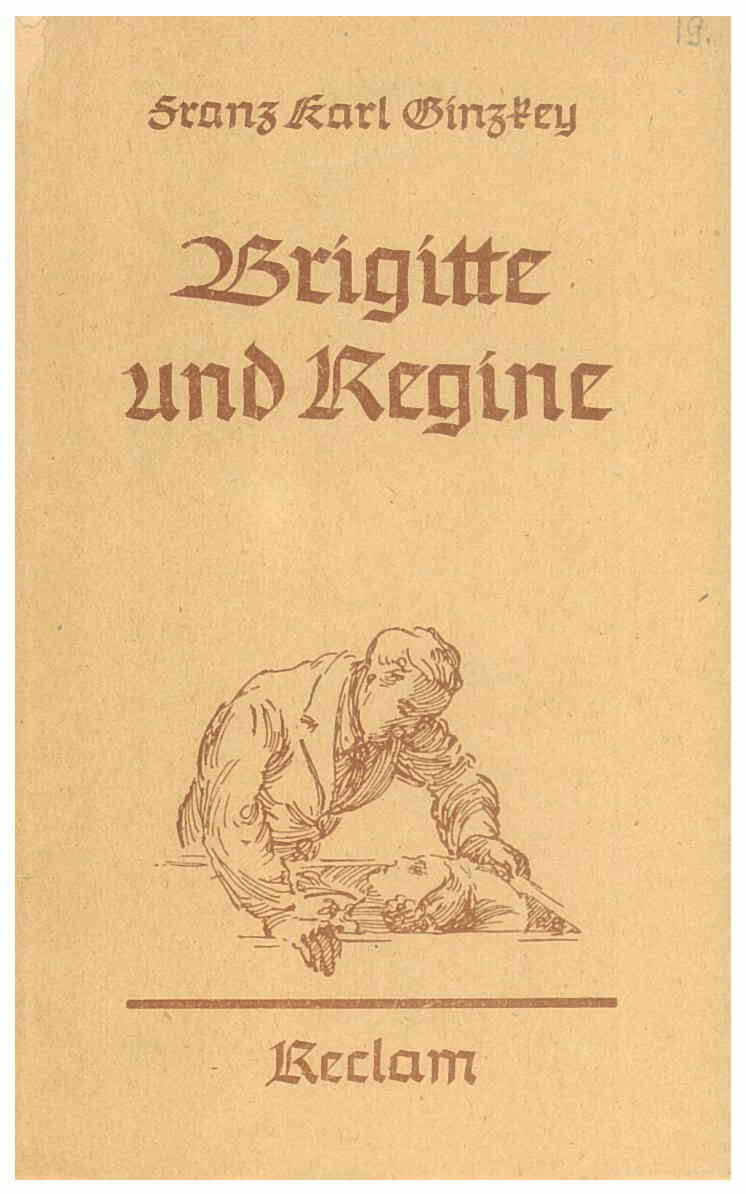 Franz Karl Ginzkey: Brigitte und Regine. Reclam, Leipzig 1944